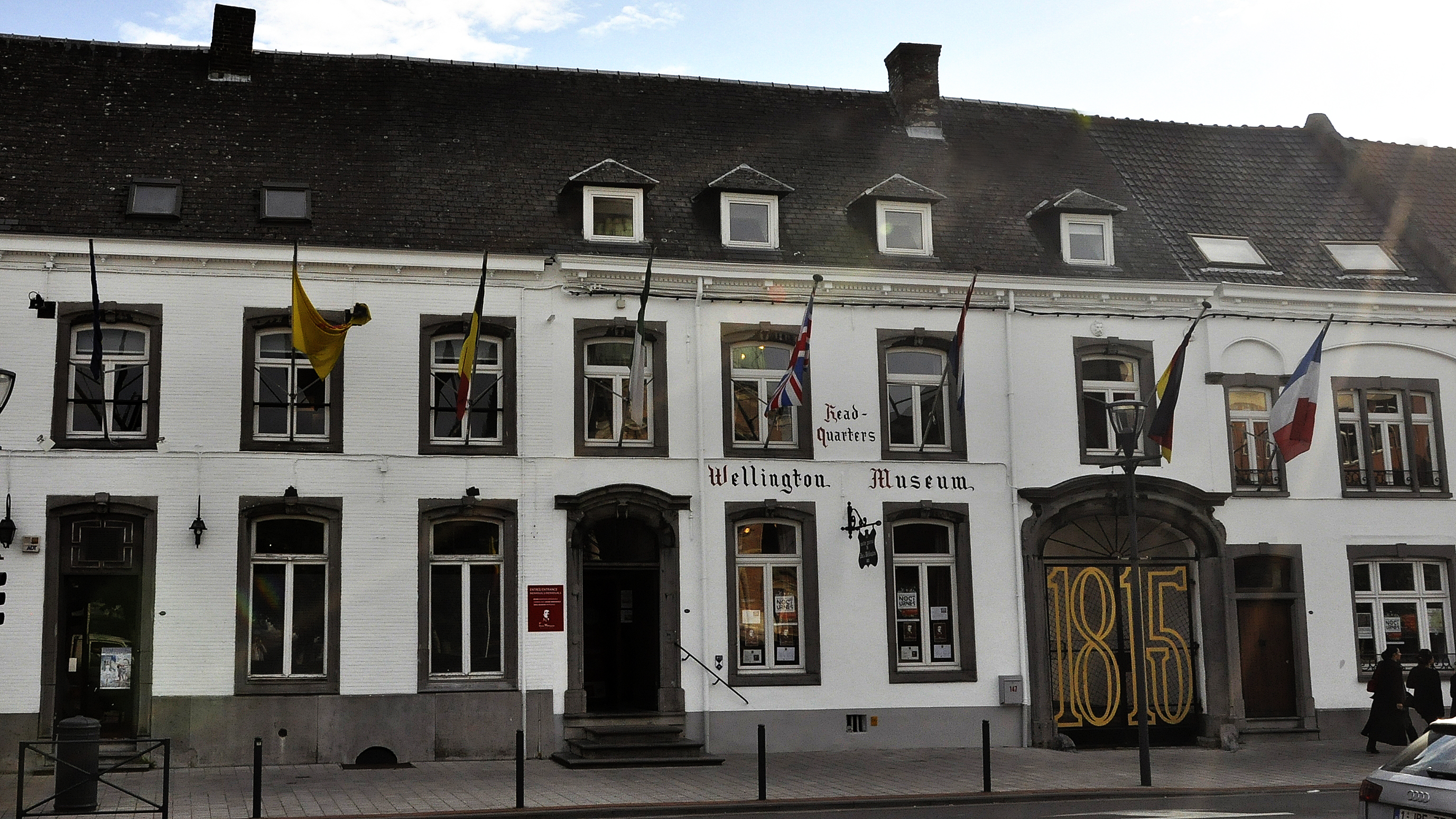 Wellington Museum in Waterloo, België